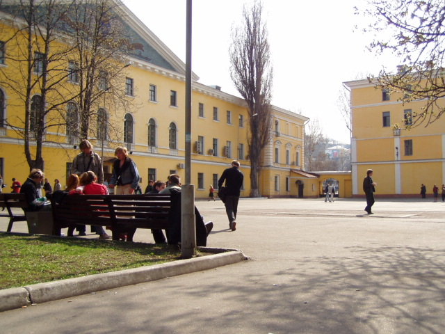 NaUKMA patio